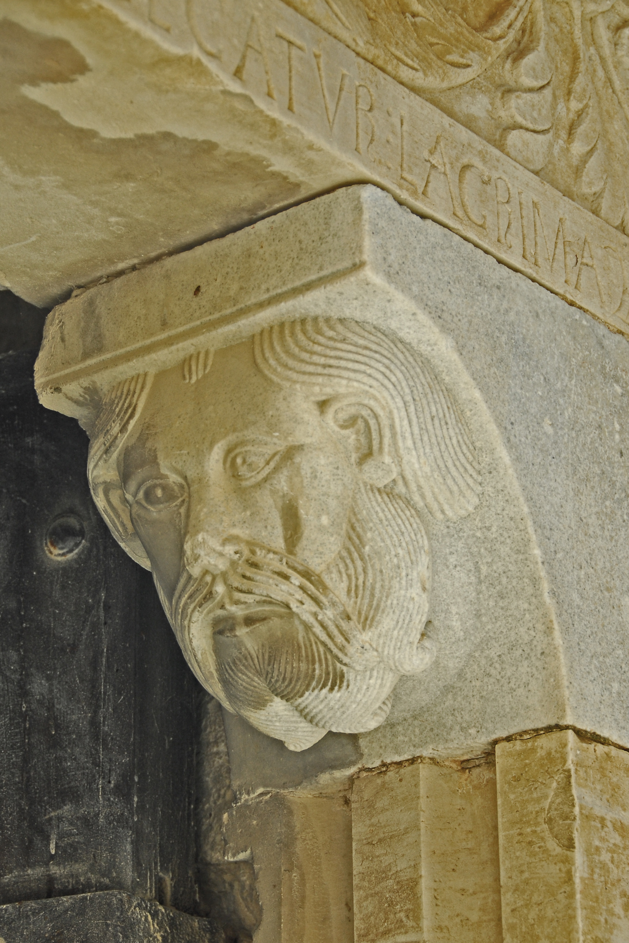 St-Pierre-et-St-Paul de Maguelone, Hauptportal, Kopfportrait Petrus